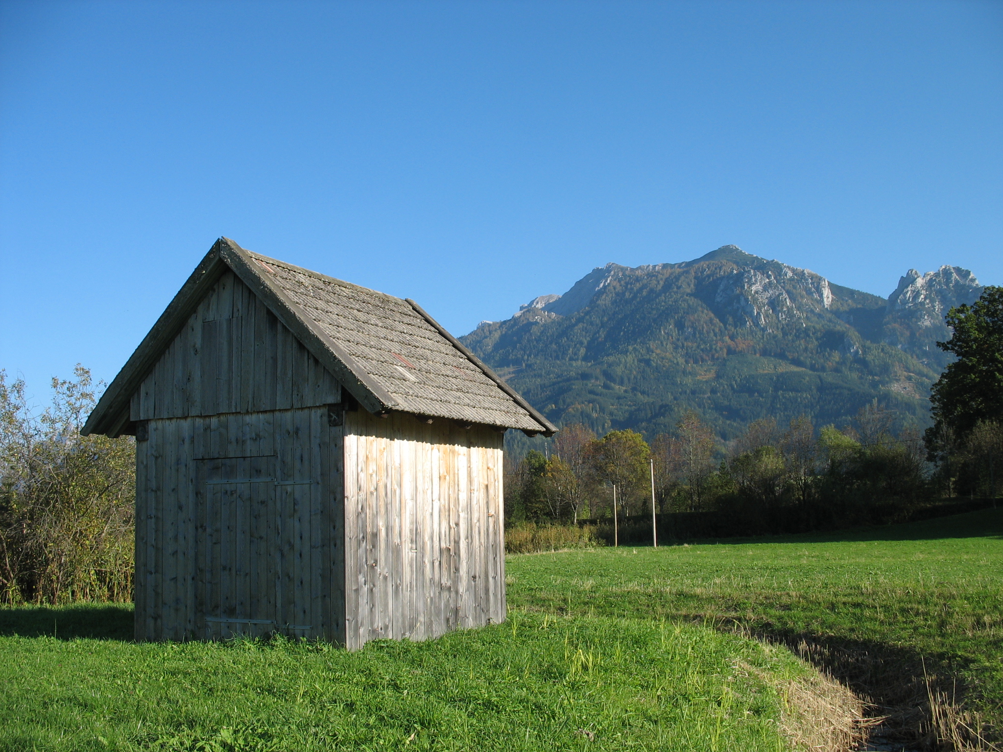 Typischer landwirtschaftlicher Geräteschuppen, Steiermark, westlich von Admont